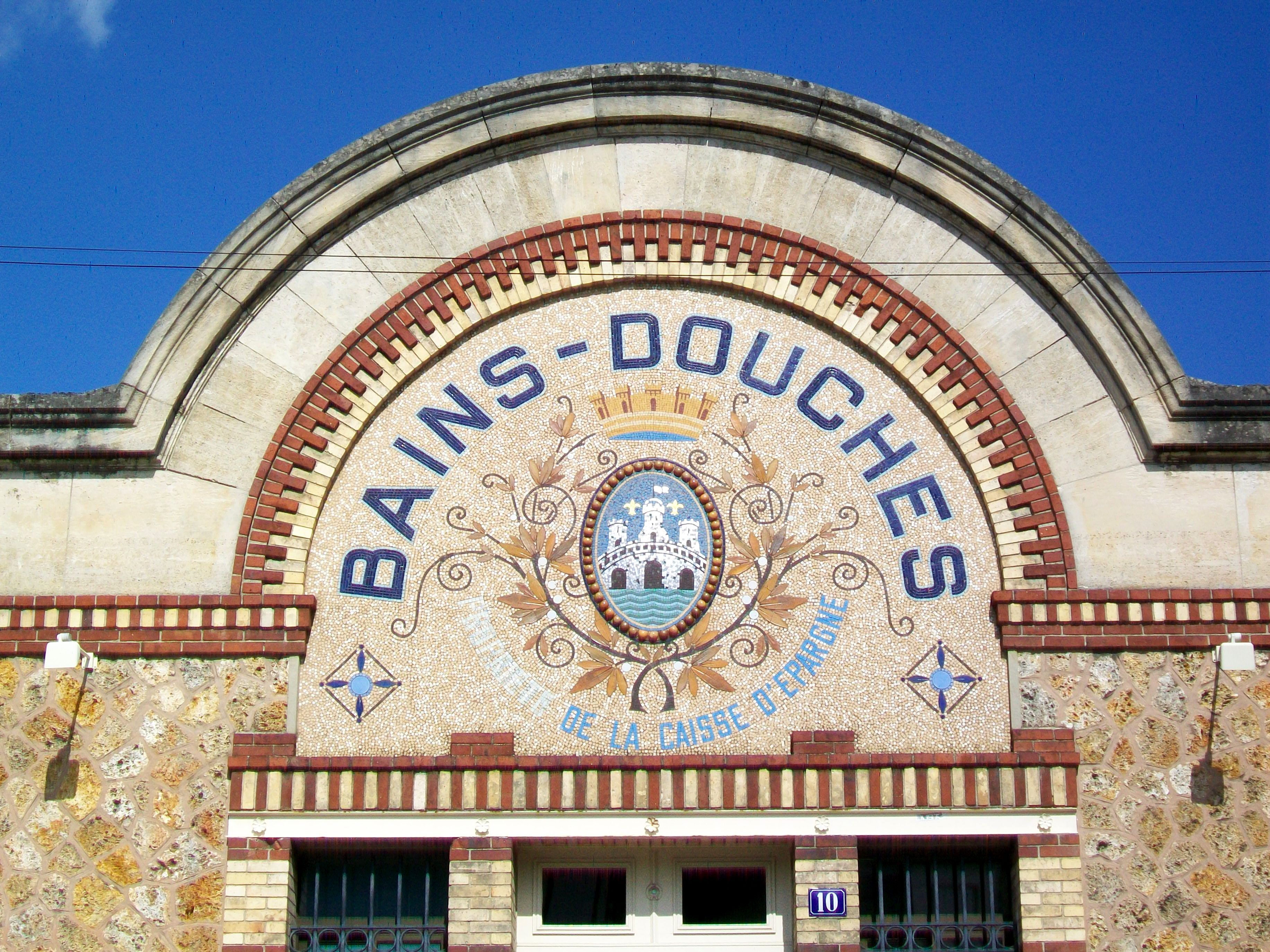 Les anciens bains-douches de 1913, propriété de la Caisse d'Épargne jusqu'à son rachat par la commune en 1953 ; 10 place du Parc-aux-Charettes.